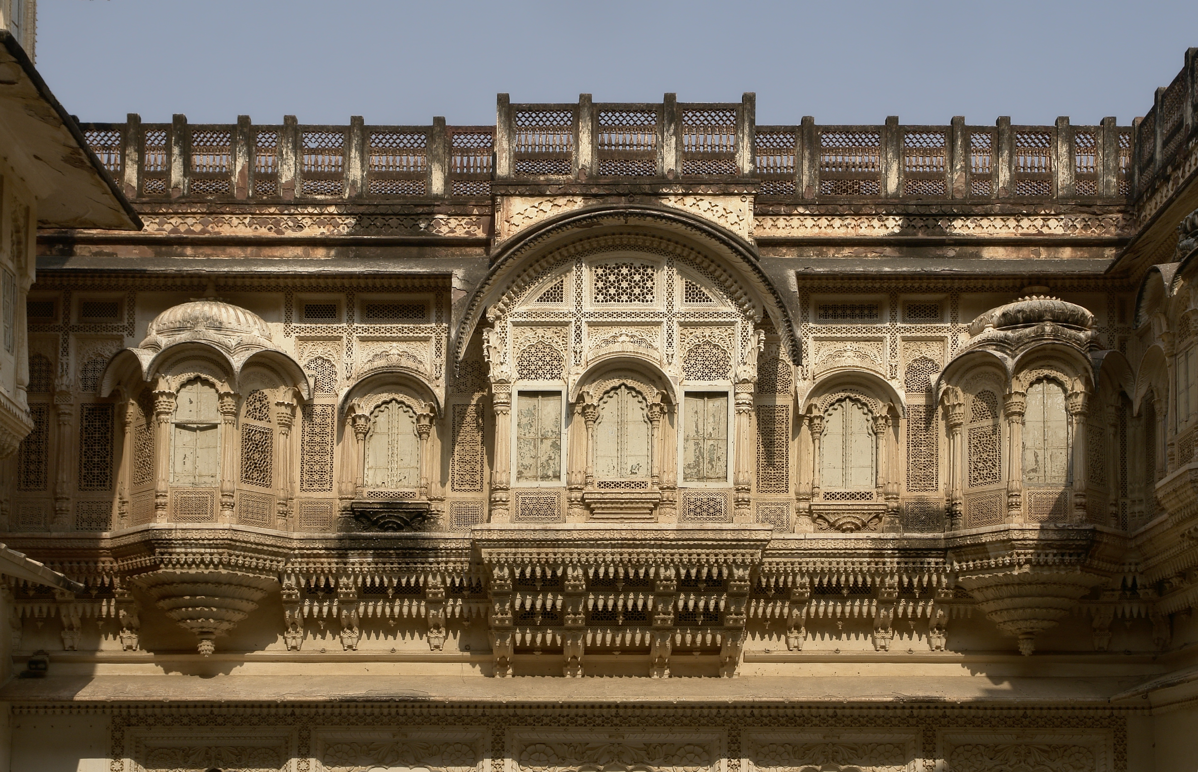 Mehrangarh Fort, Jodhpur, Rajasthan, India.